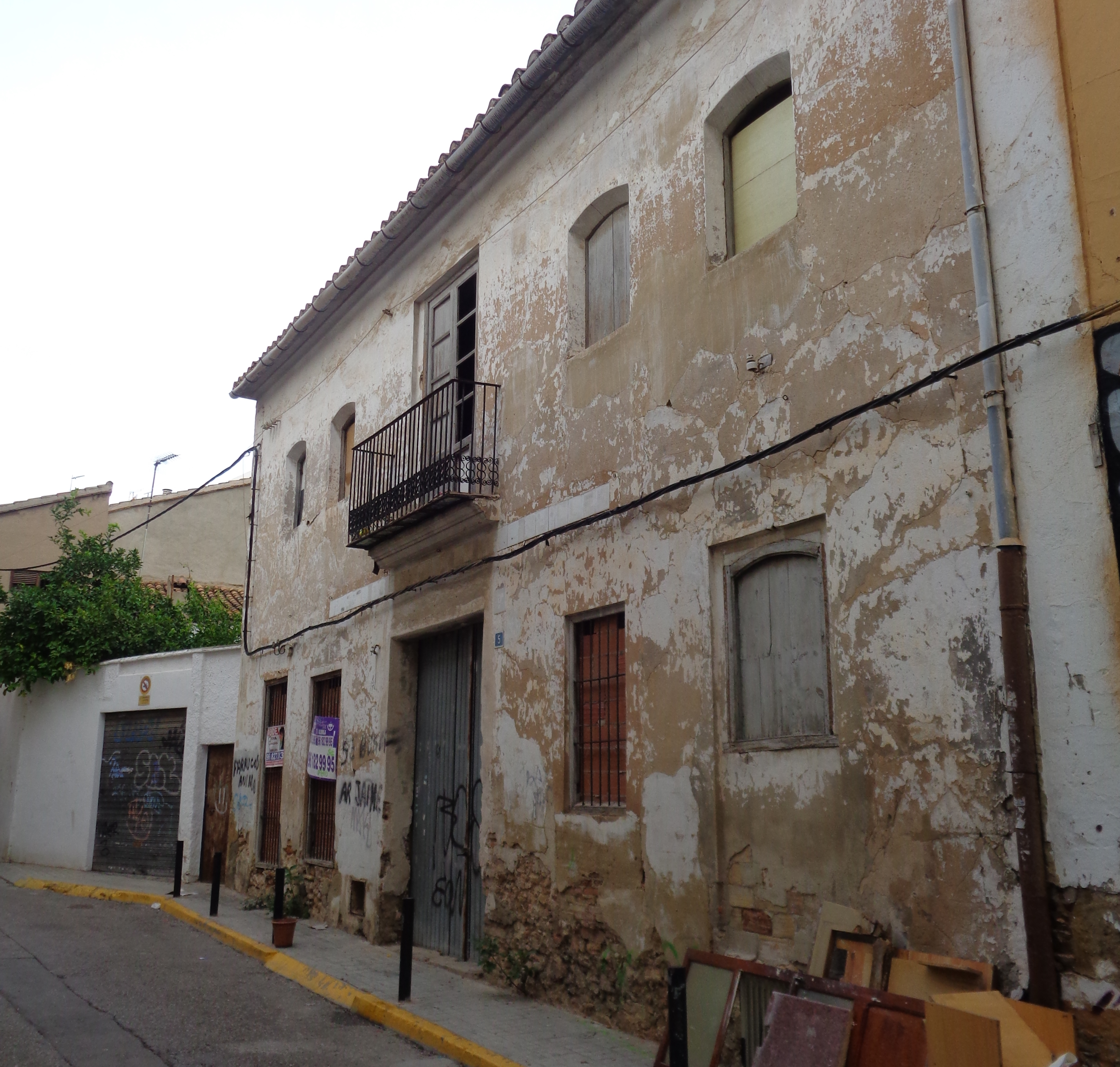 Paterna.